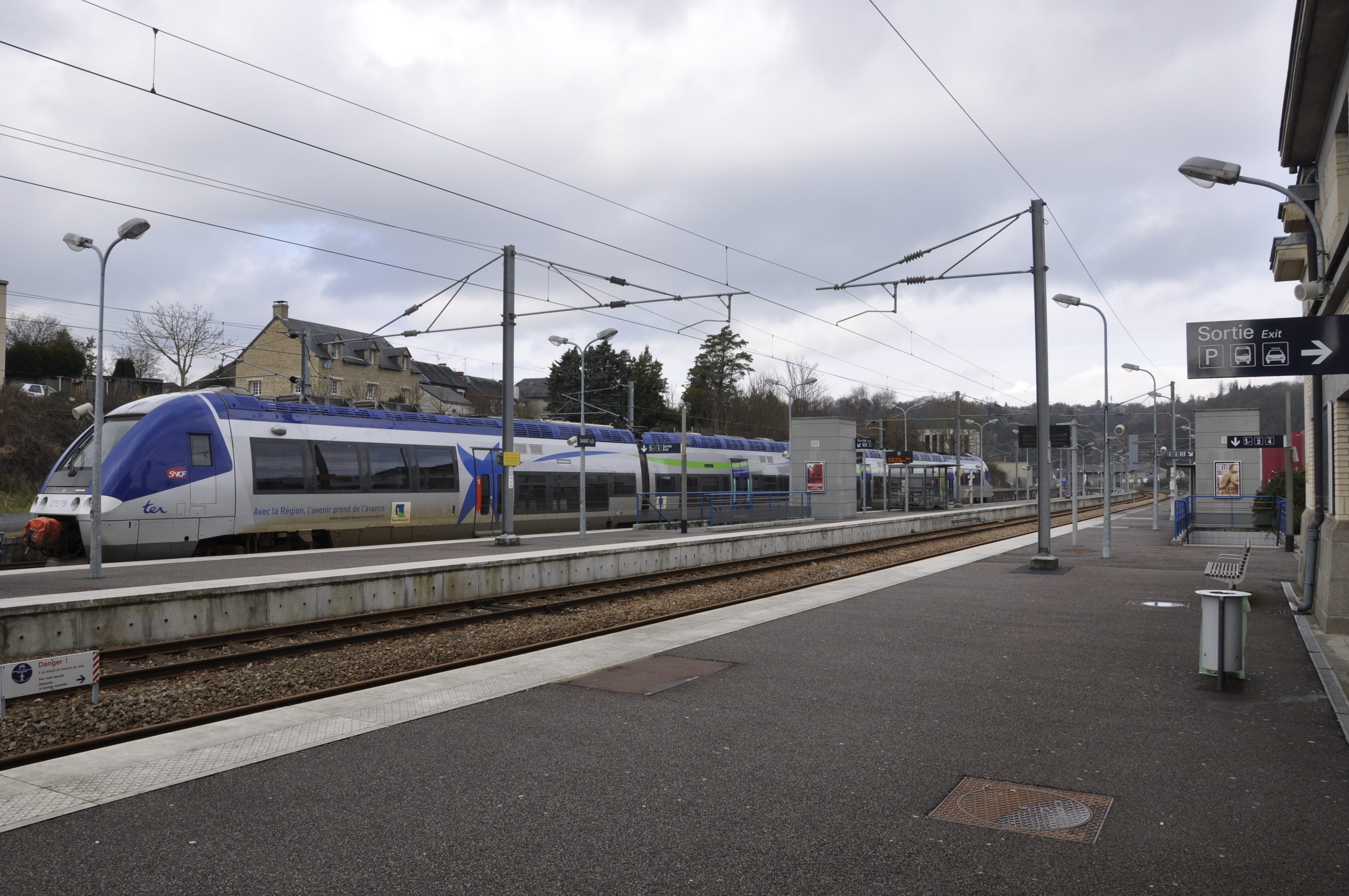 quais et passage souterrain gare de Saint-Lô